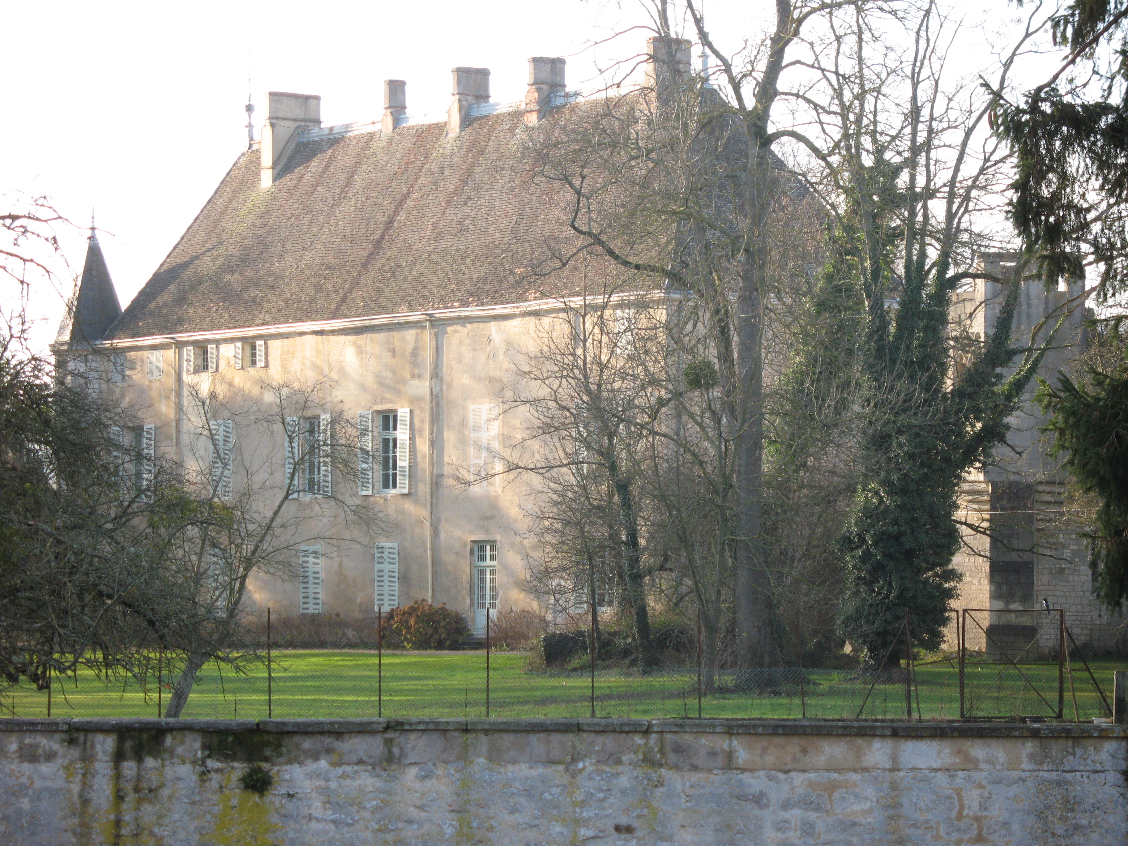 château de Germolles (Saône-et-Loire)